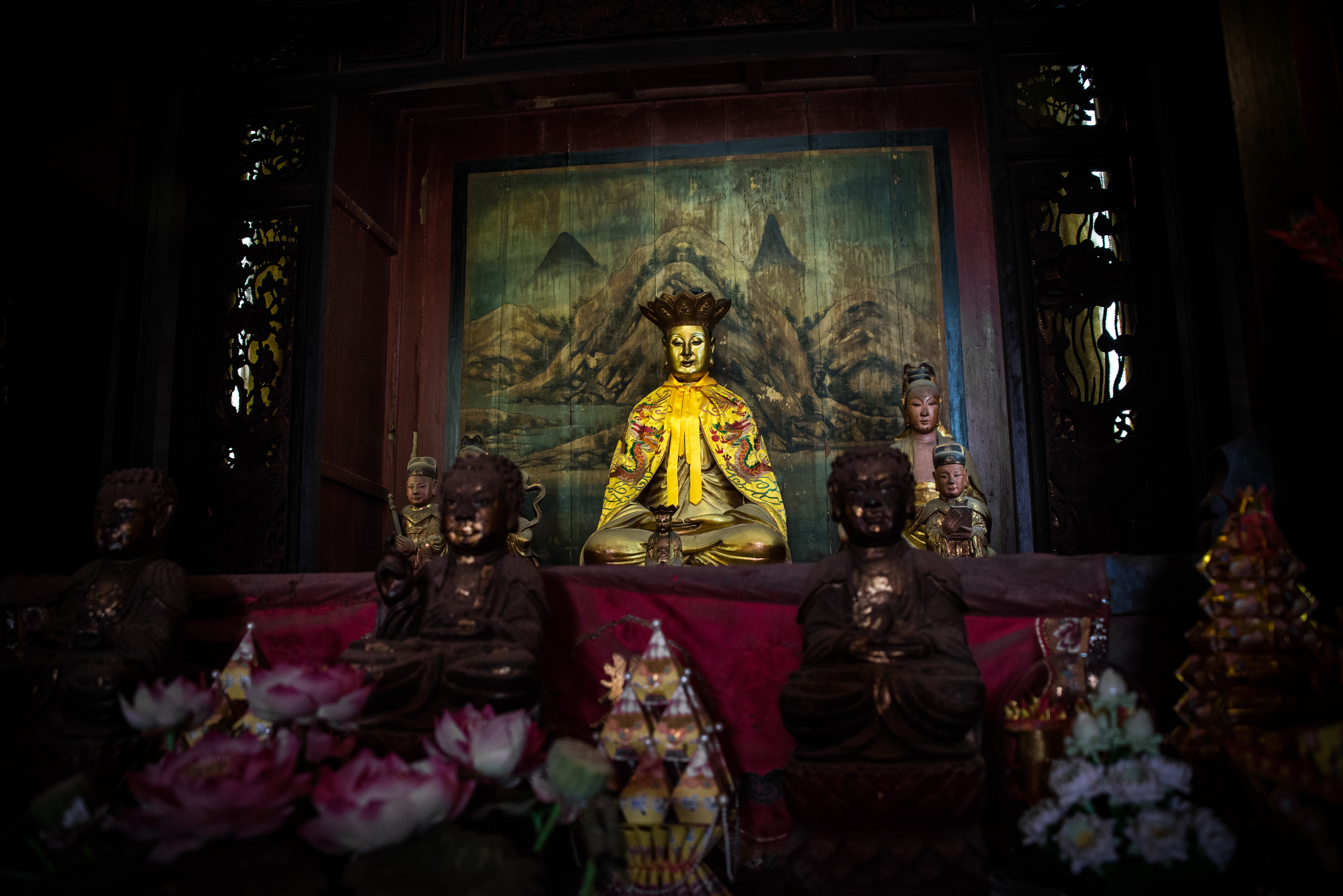 ศาลเจ้าเกียนอันเกง